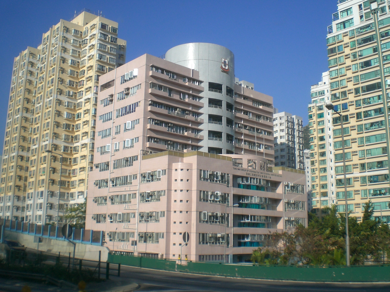 香港屯門公路望屯門東華三院戴東培社會服務大樓